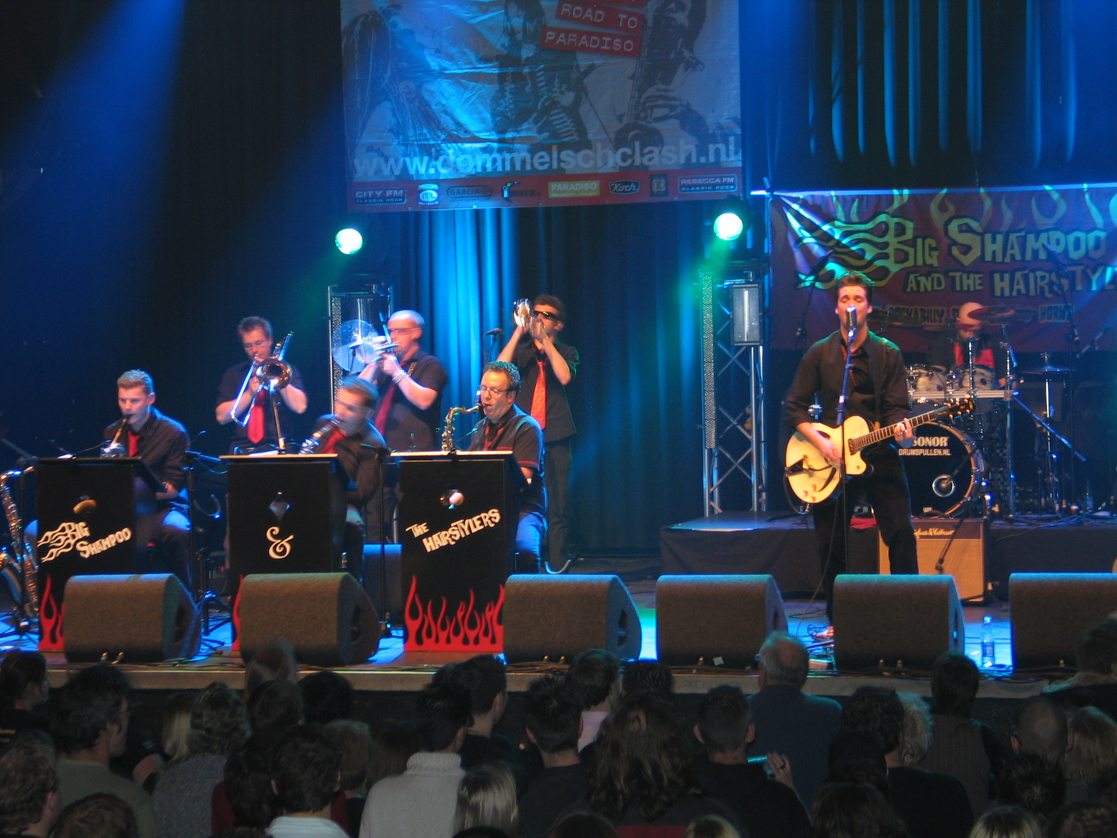 Big Shampoo & The Hairstylers, live tijdens regiofinale clash of the coverbands 2007/2008 in 013 Tilburg